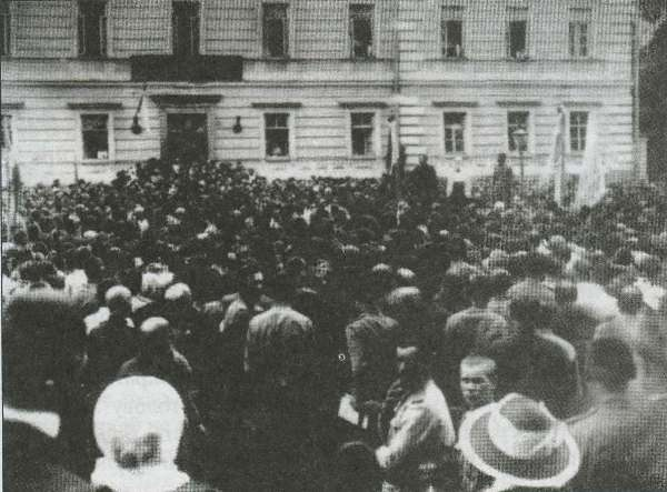 Михайло Грушевський вітає 3-й Український Козацький полк імені М.Грушевського перед відправленням на фронт. [Київ. 1 липня 1917 р.]